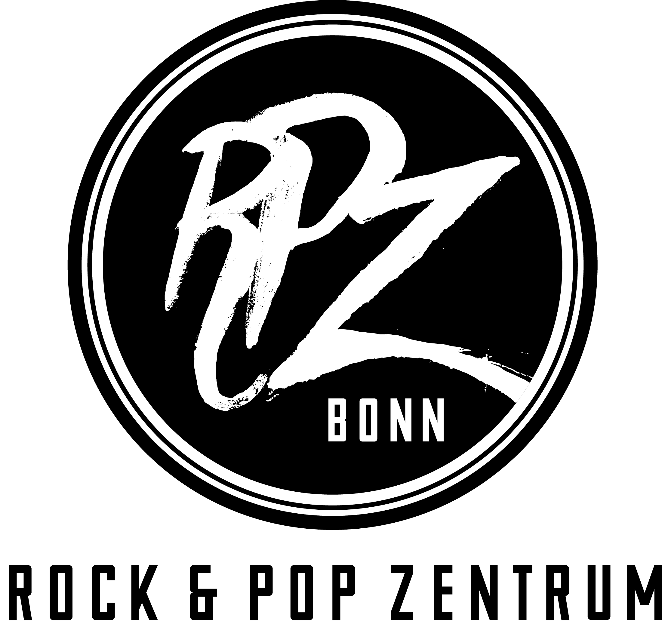 Logo des Rock & Pop Zentrums Bonn (RPZ Bonn)